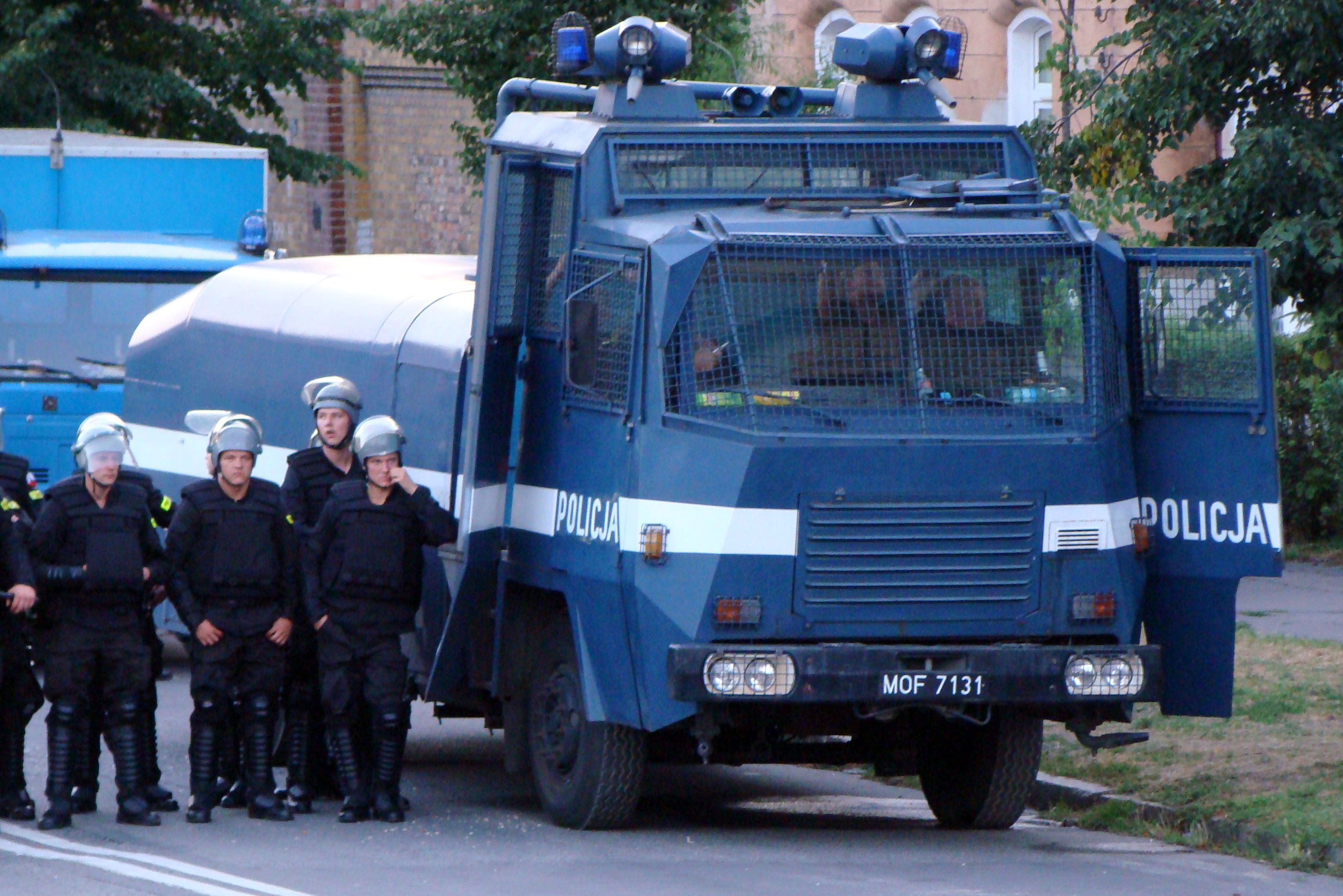 Hydromil II, służąca do rozpędzania demonstrantów armatka wodna będąca na wyposażeniu ZOMO. Po upadku PRL-u, w służbie Oddziałów Prewencji Policji. Obecnie - wycofane z eksploatacji i zastąpione Tajfunami na bazie Renault. Hydromil II powstał w 1983 roku w Polmo-SHL Kielce w oparciu o podwozie samochodu ciężarowego Jelcz P420, a wzorowany był na austriackich armatkach Steyera, które były używane przez ZOMO w latach 70. Na foto: użyta przy zabezpieczeniu imprezy sportowej o wysokim stopniu ryzyka (2008 r.). Samochód ten ma jeszcze milicyjną tablicę rejestracyjną